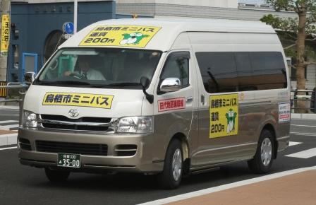 鳥栖市ミニバスの画像